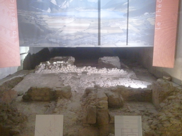 Reste d'une ancienne villa romaine près de l'actuelle rocade